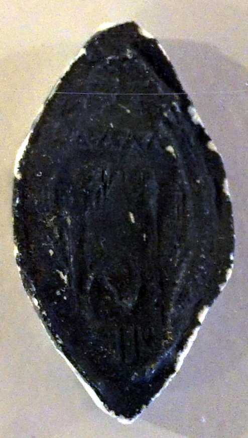 présenté lors de l'exposition.